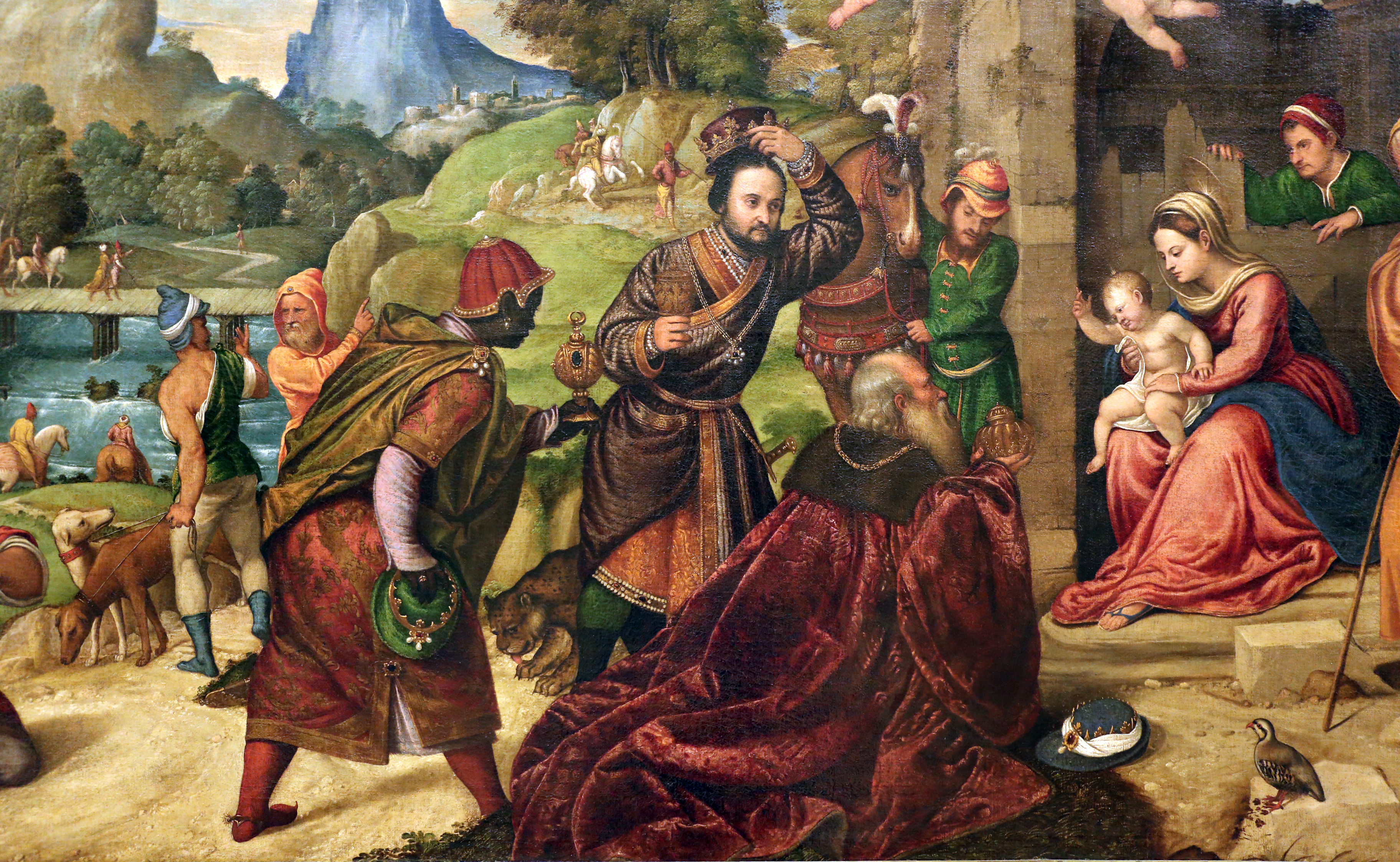 Palazzo dei Musei (Modena) This is a photo of a monument which is part of cultural heritage of Italy.